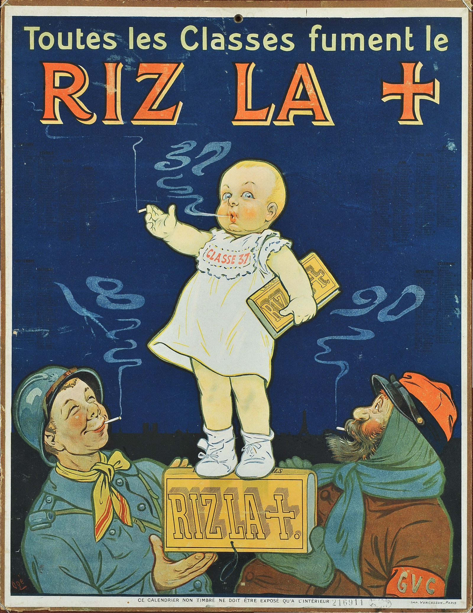 Toutes les Classes fument le Riz La [Croix] : [carton publicitaire] : lithogr., en coul. ; 47 x 36 cm : [éditeur inconnu], [1917] (Paris) : imp. Vercasson.